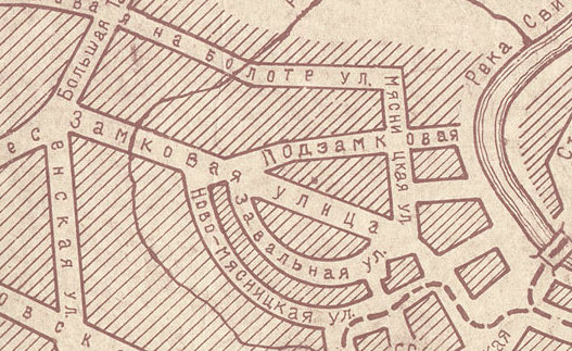 Замчышча на плане Мінска 1898 г.